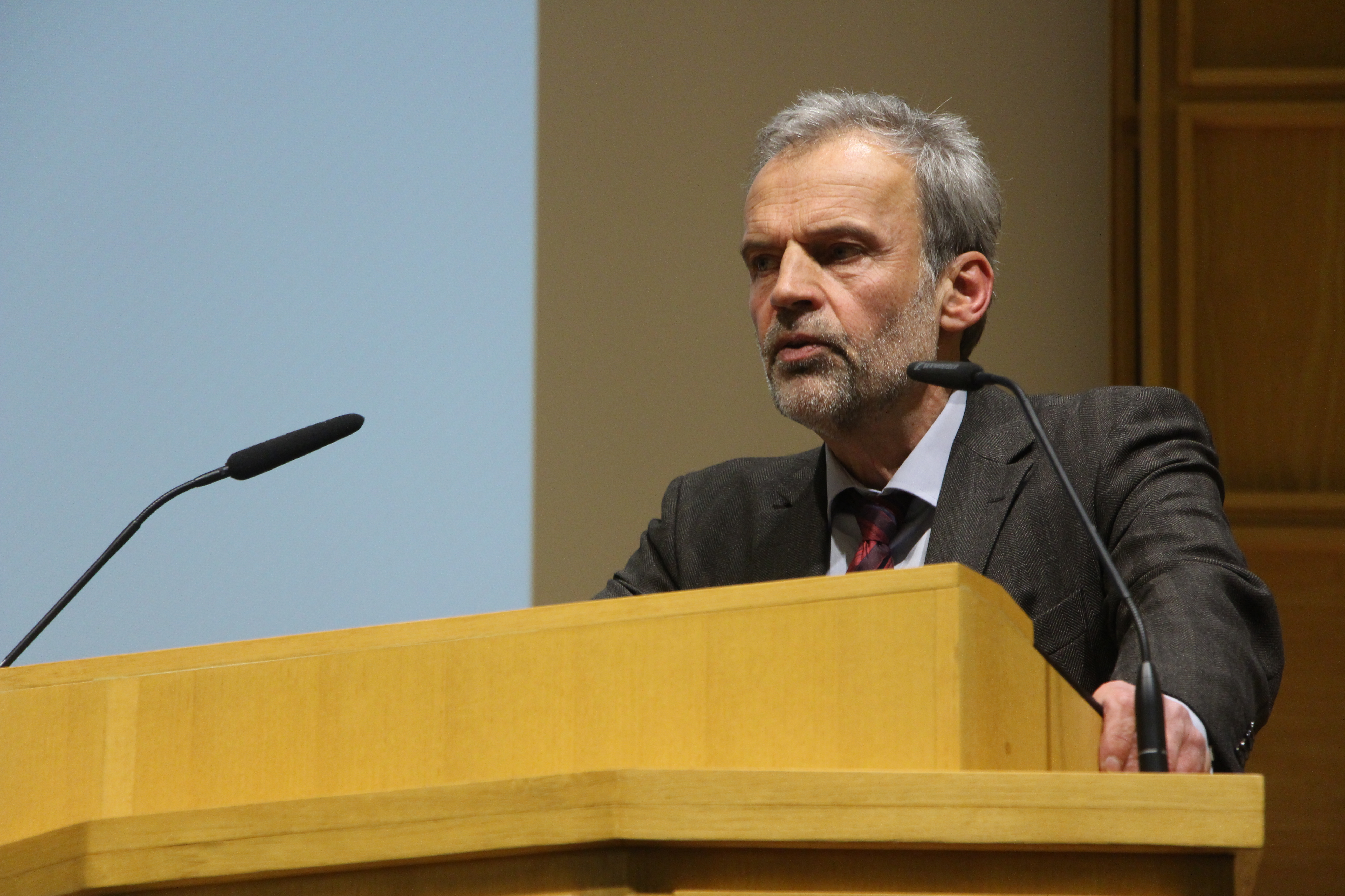 Wissenschaftsforum Universität Konstanz Gerda-Henkel-Stiftung 2015, Düsseldorf.